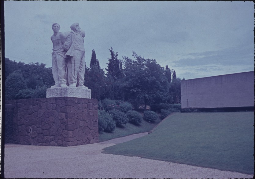 Gedenkstätte der Fosse Ardeatine in Rom aus dem Jahr 1964